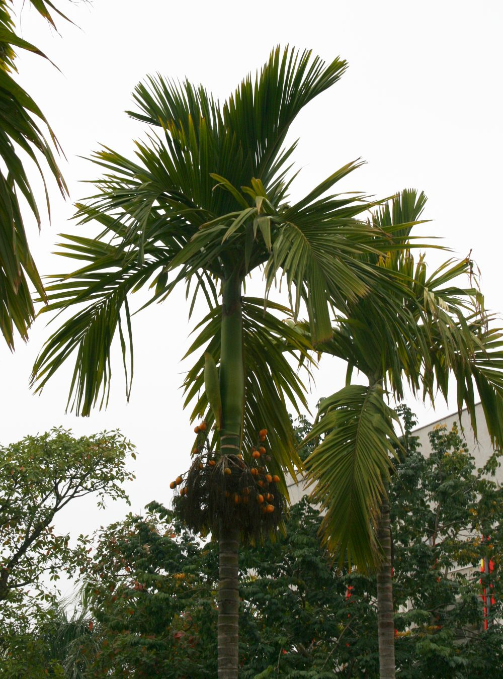 Areca catechu, Palmen (Arecaceae) - Vietnam/Việt Nam: Hanoi/Hà Nội, Ein-Säulen-Pagode/Chùa Một Cột